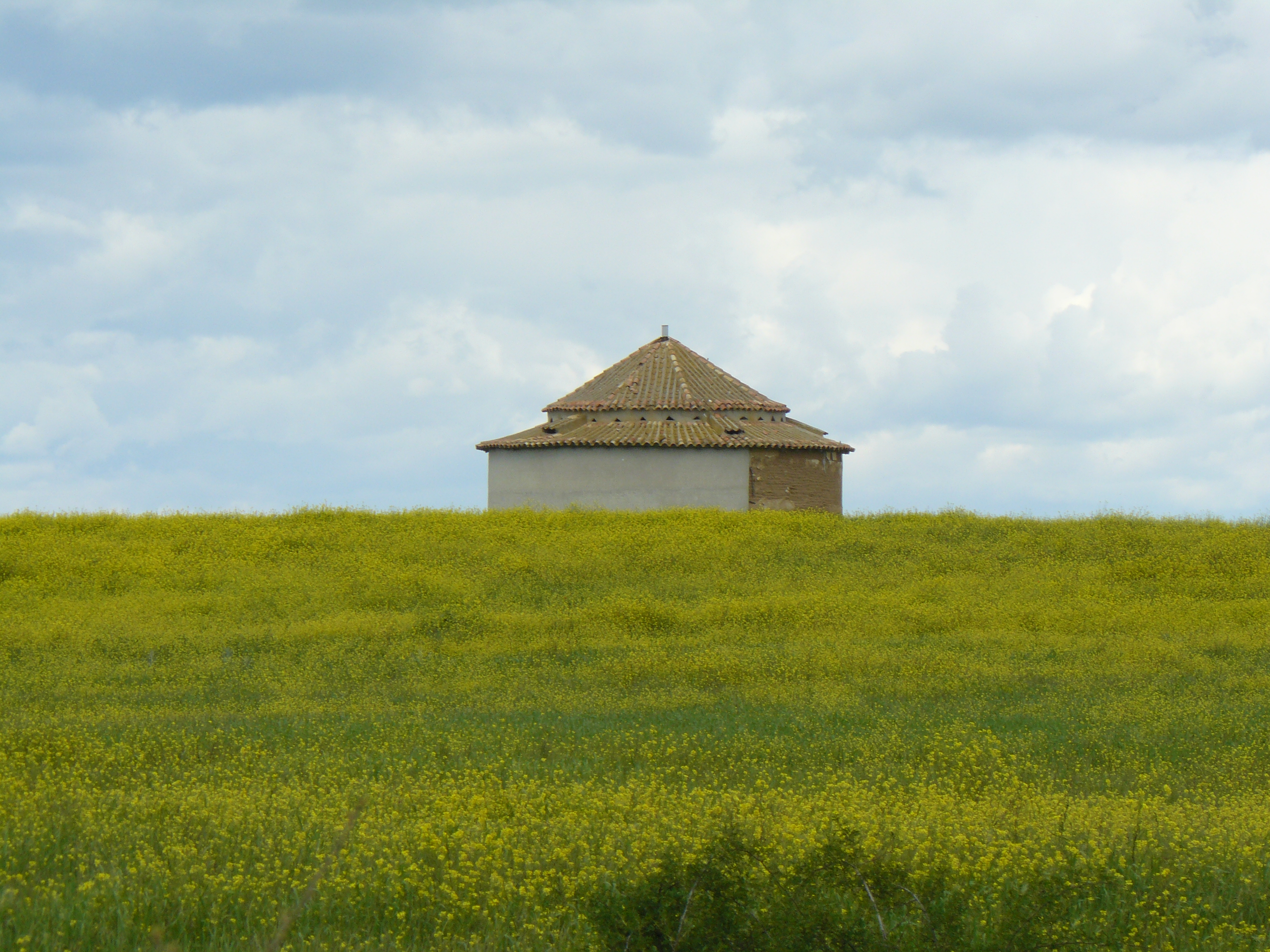 Capillas, Palencia.